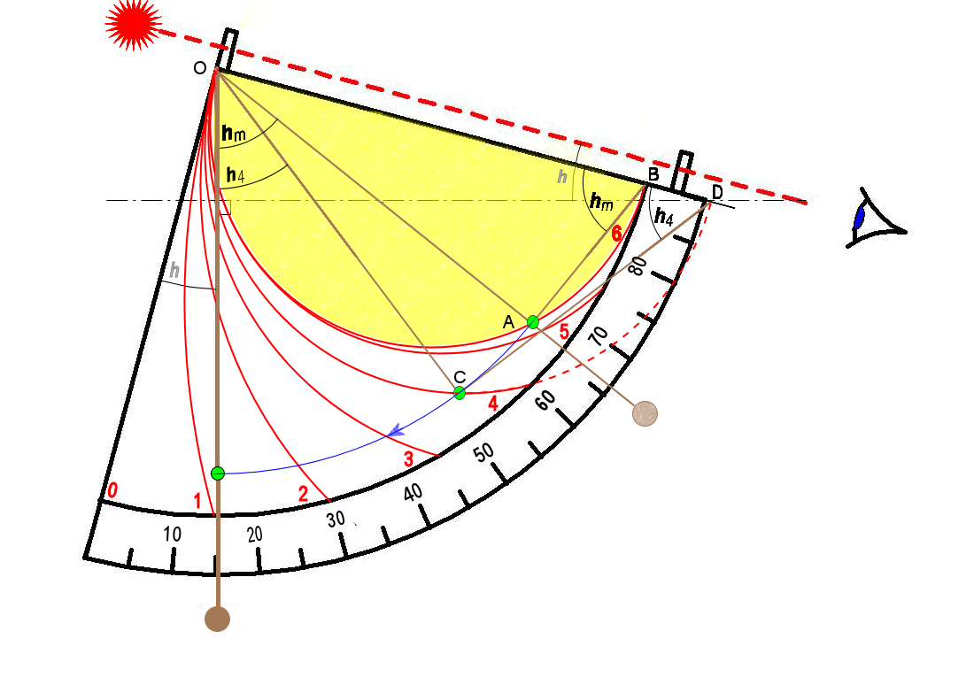 Comment lire l'heure, après réglage, sur un quadrant ancien simple.